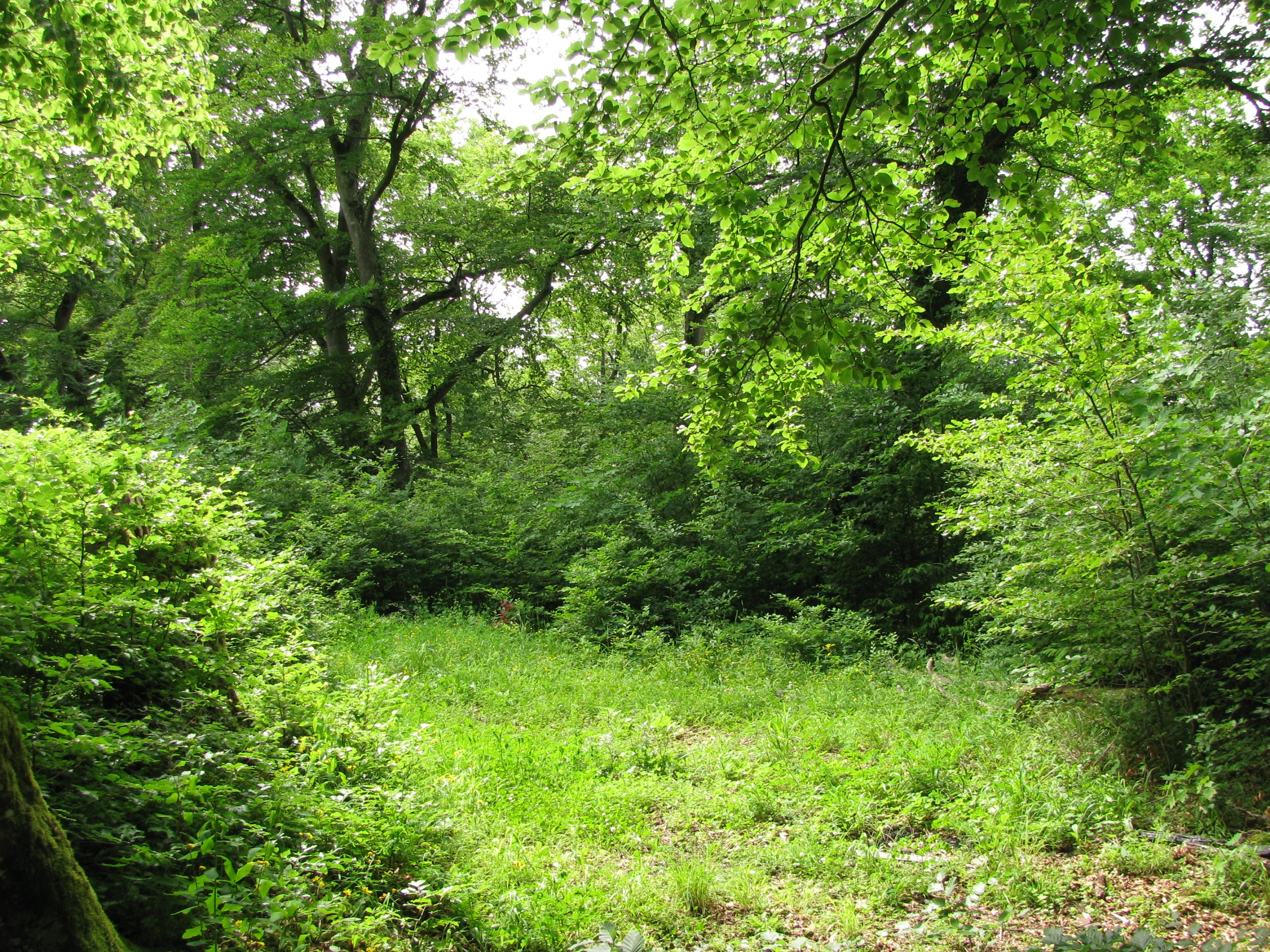 Standort der ehem. Hauptburg, nach Südwesten.